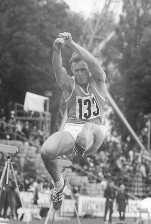 Max Klauß ADN-ZB Deutsche Demokratische Republik Demme German Democratic Republic. Max Klauss. Mitglied der DDR-Olympiamannschaft 1972 - Weitsprung -. Member of the GDR 72 Olympic team - long jump - Copyright: ADN-ZB